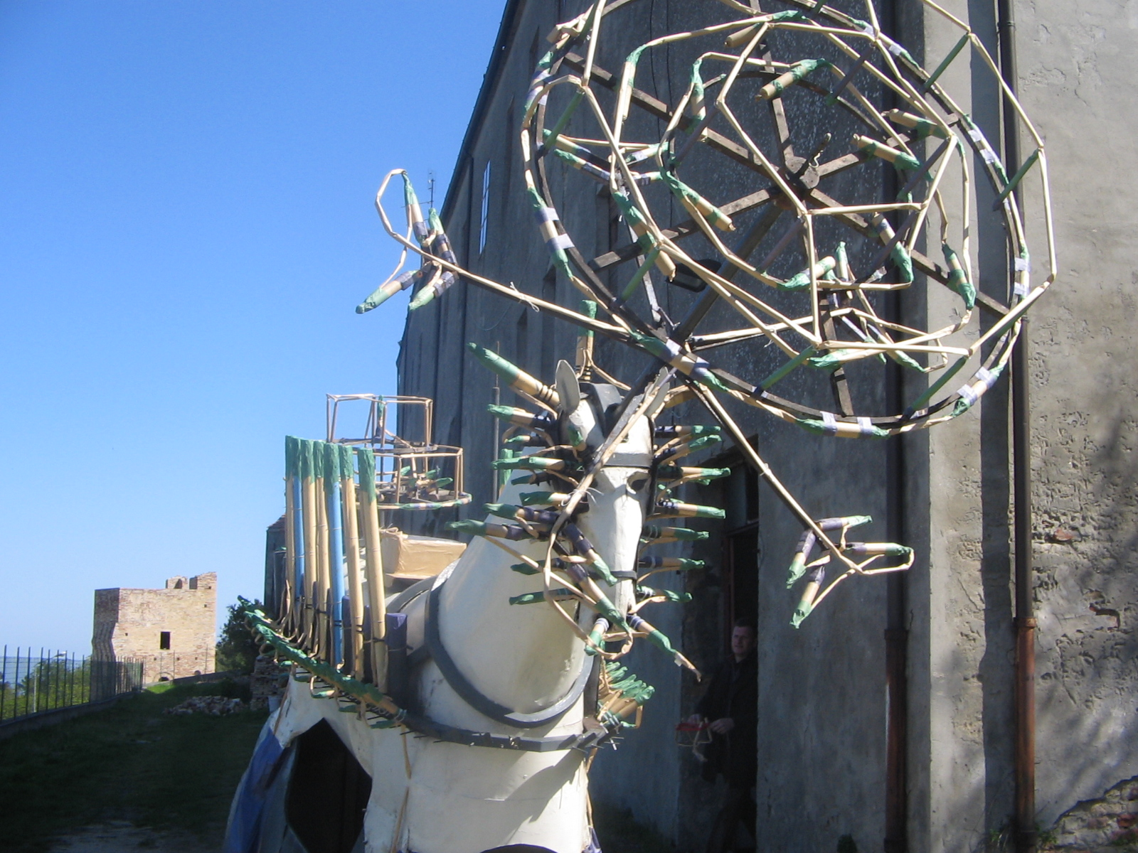 Foto del Cavallo la mattina